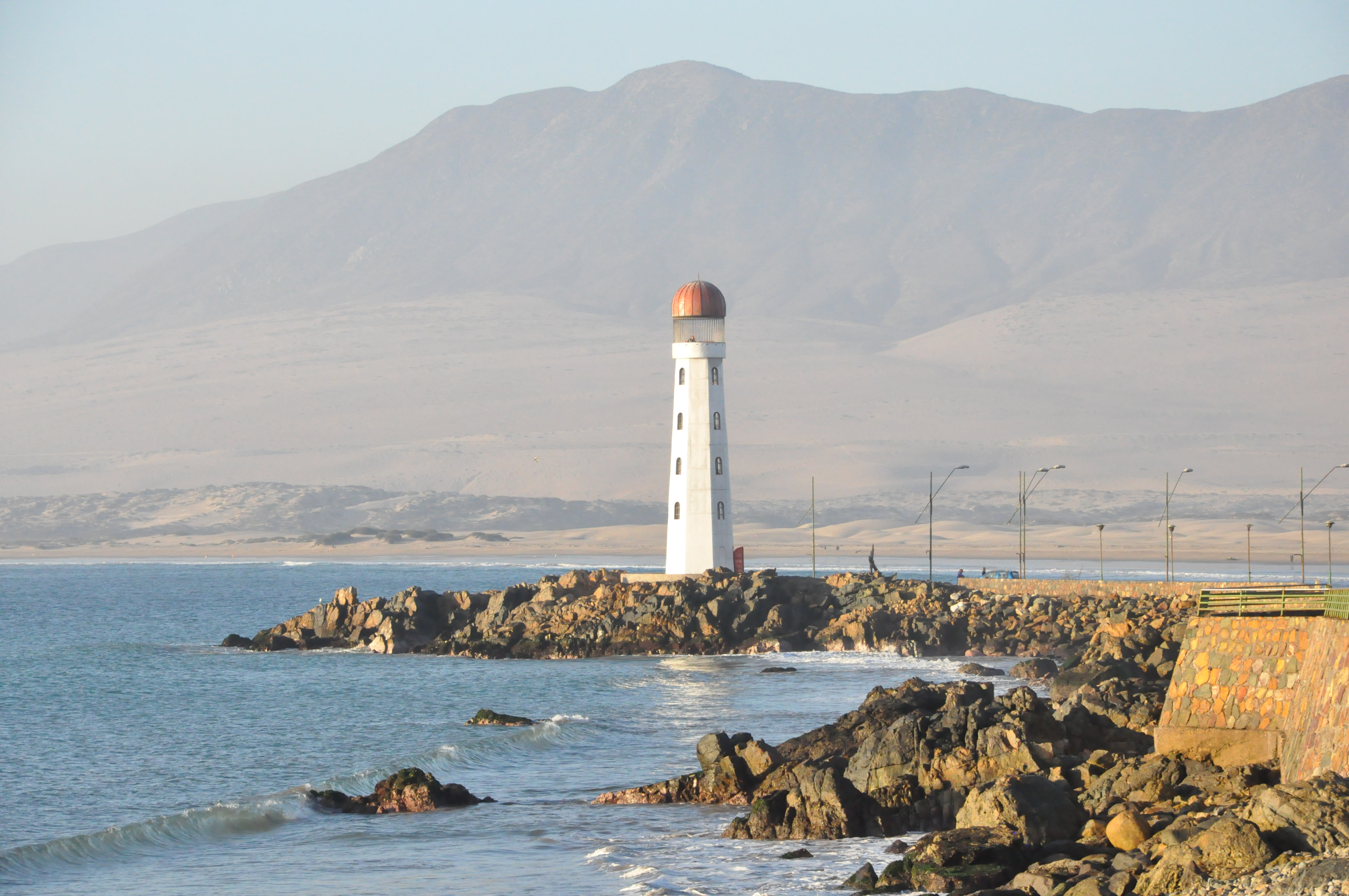 Faro Monumental en Playa Grande en la localidad de Huasco